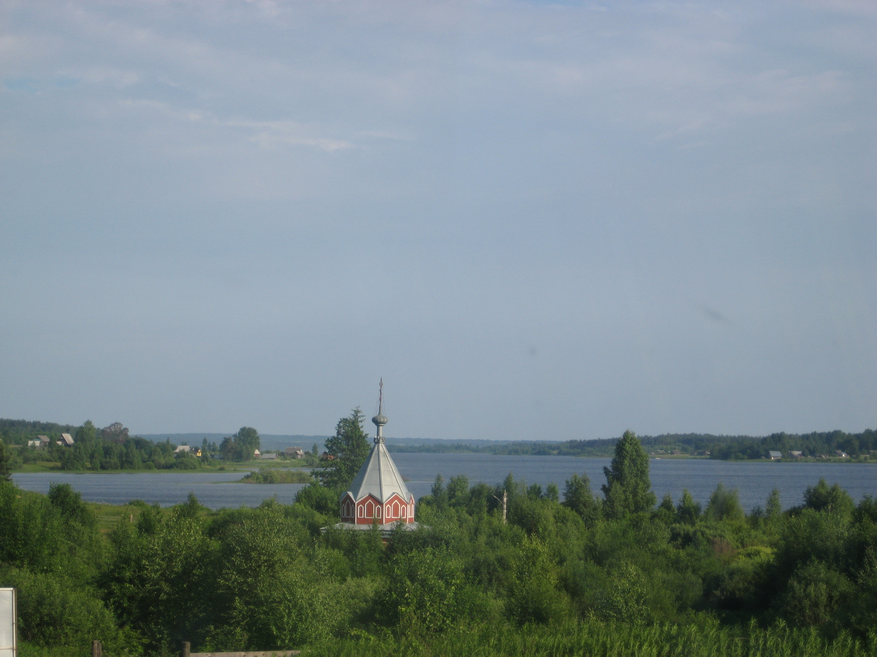 Вид на озеро Вселуг с погоста (The view on the Volgo lake)